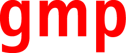 Logo von gmp